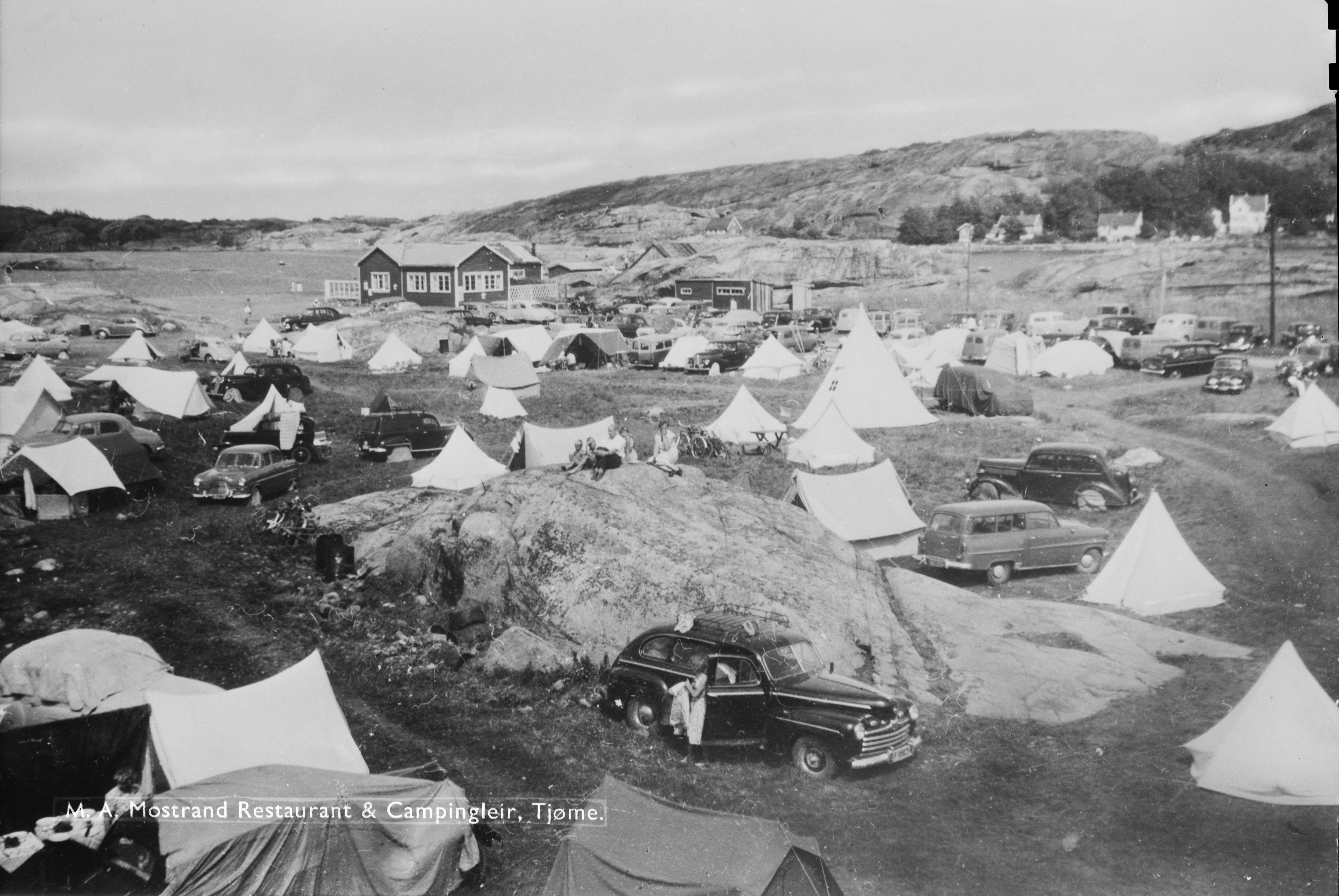 «M. A. Mostrand restaurant & campingleir, Tjøme» fotografert av Mittet & Co. AS, trolig på 1950-tallet. Beskåret versjon av foto fra Nasjonalbibliotekets bildesamling. Mostranda er en badeplass sør på øya Tjøme i Færder kommune ved Oslofjorden. «M. A.» står for Motorførernes Avholdsforbund.